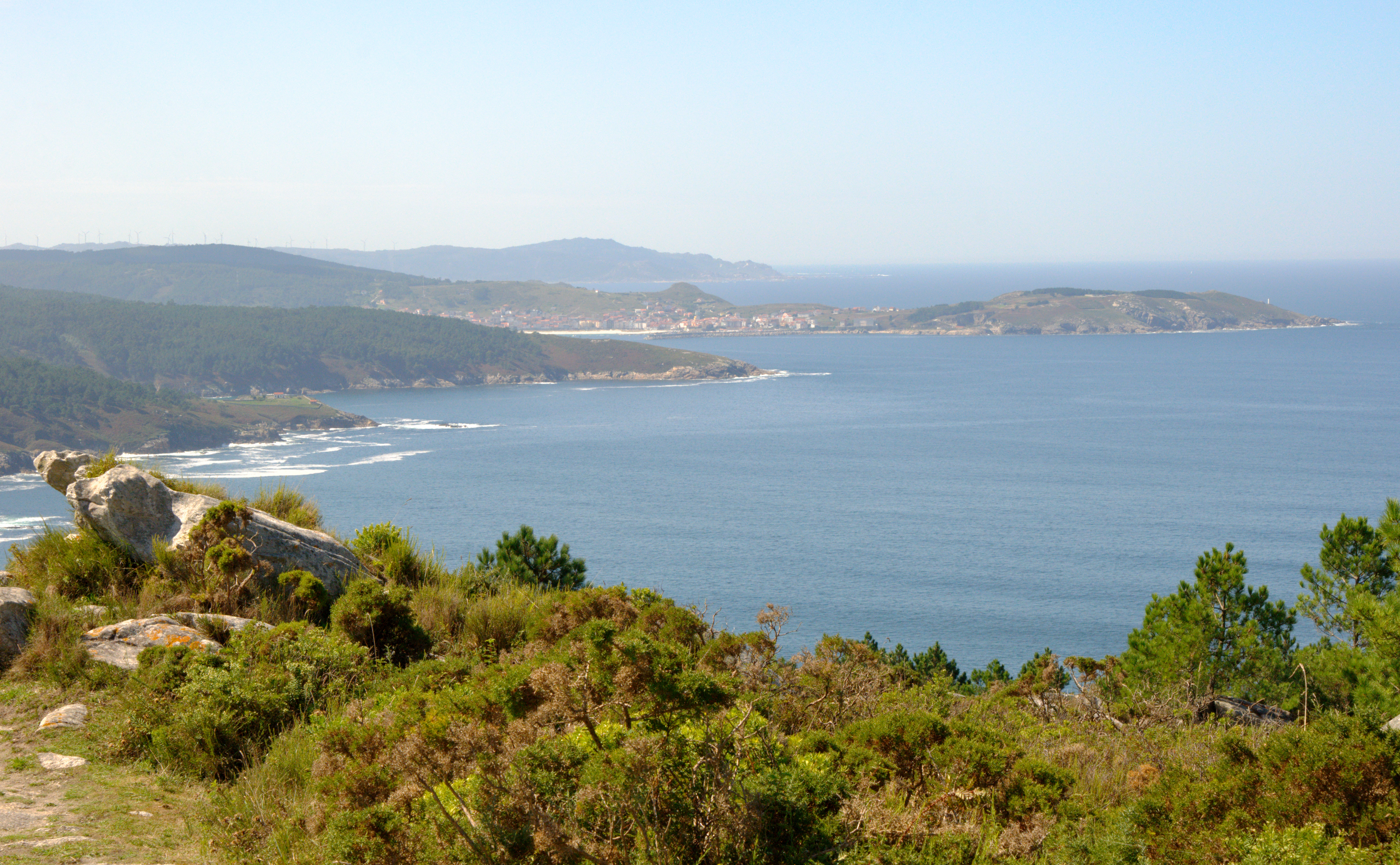 Sobre el Monte Branco cerca de Puenteceso, vista a la ría de Corme y Laxe